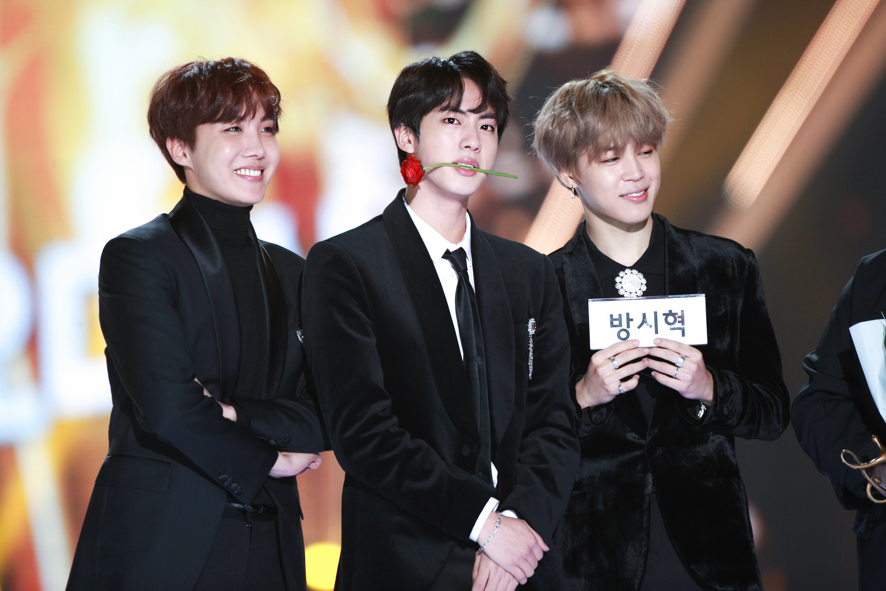 180125 방탄소년단